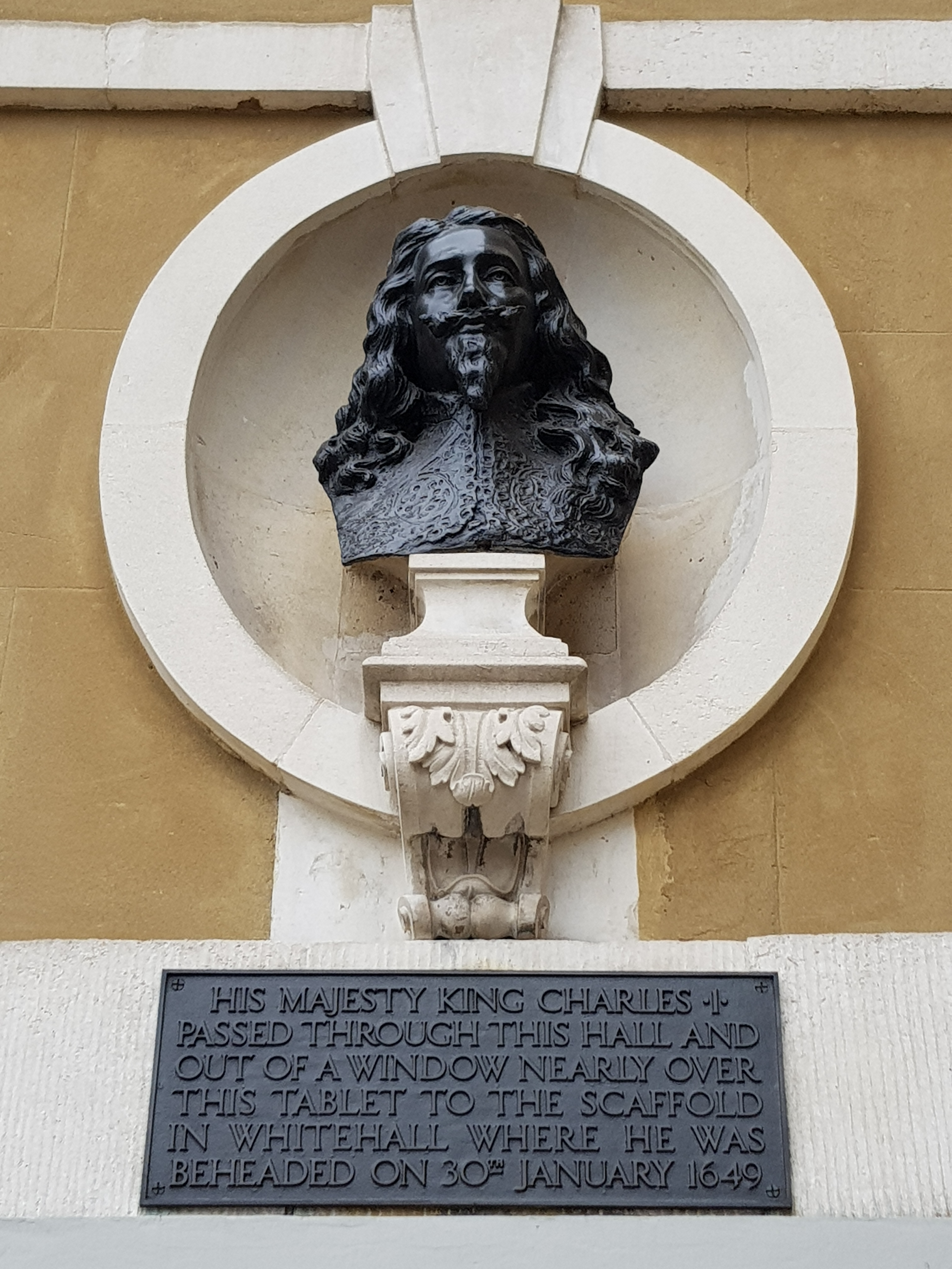 Statue en buste de Charles 1er, roi d'Angleterre, décapité le 30 janvier 1649 devant la Maison des banquets (Banqueting House) à Londres.